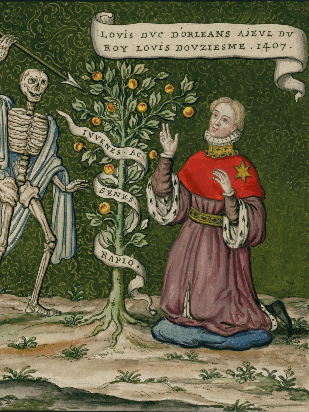 "La Mort menaçant Louis d'Orléans à genoux" (détail), d'après la chapelle des Célestins à Paris, XVIe siècle, Paris, BnF, département Estampes et photographie, fonds François Roger de Gaignières, planche 58, cote RESERVE NA-21 (2)-FOL